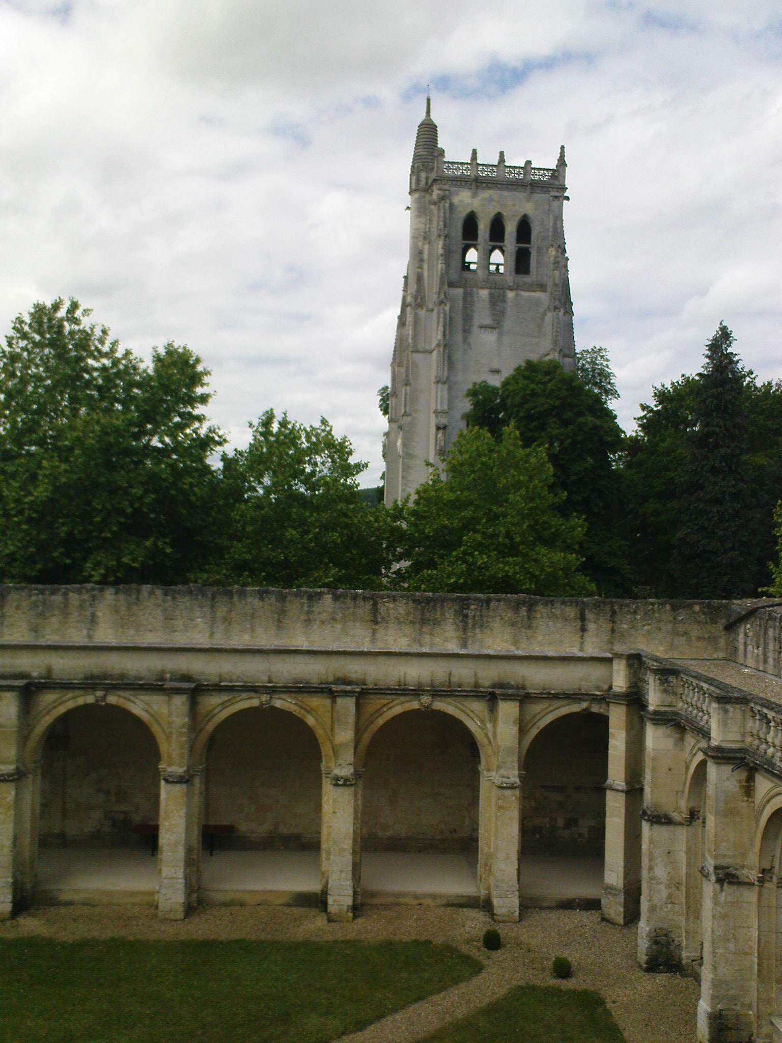 Abbaye Notre-Dame du Bec-Hellouin. Cloître et tour Saint-Nicolas.